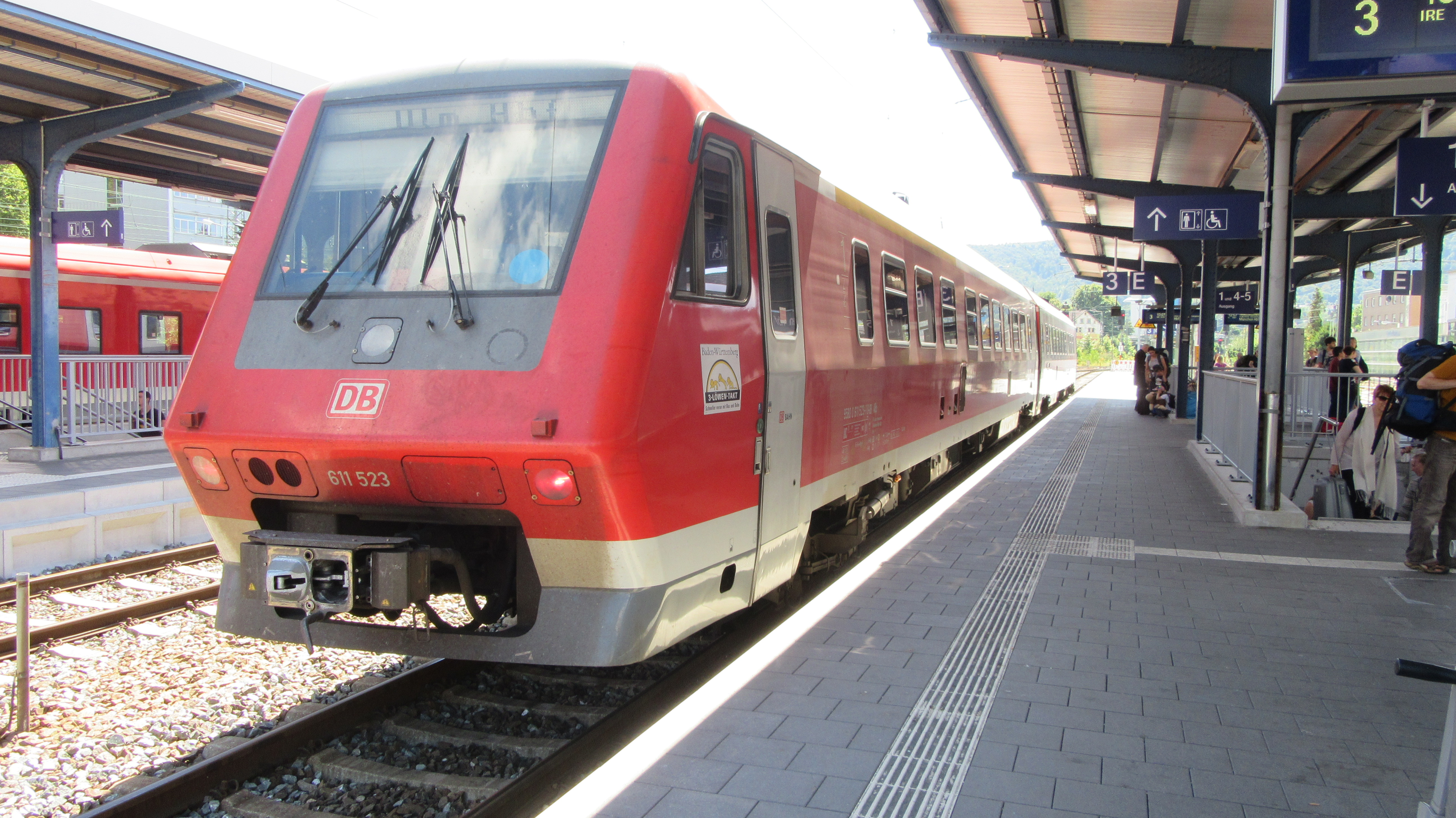 611 523 am 13. August 2016 im Bahnhof Aalen